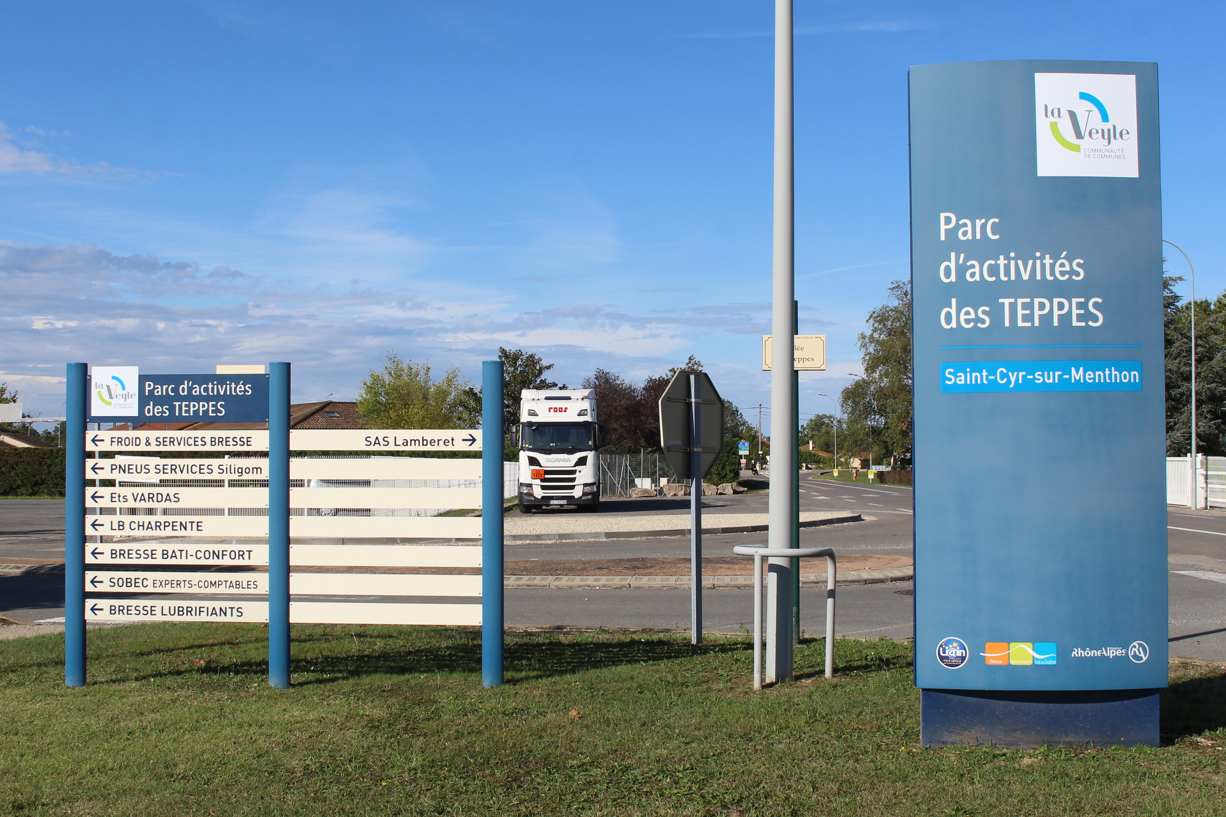 Panneau indiquant les entreprises du parc d'activités des Teppes, Saint-Cyr-sur-Menthon.